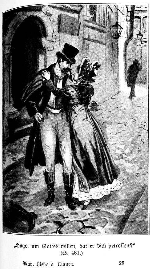 Illustration zur Seite 431 der 1900/01 erschienenen Fischer-Ausgaben des Romans Die Liebe des Ulanen von Karl May